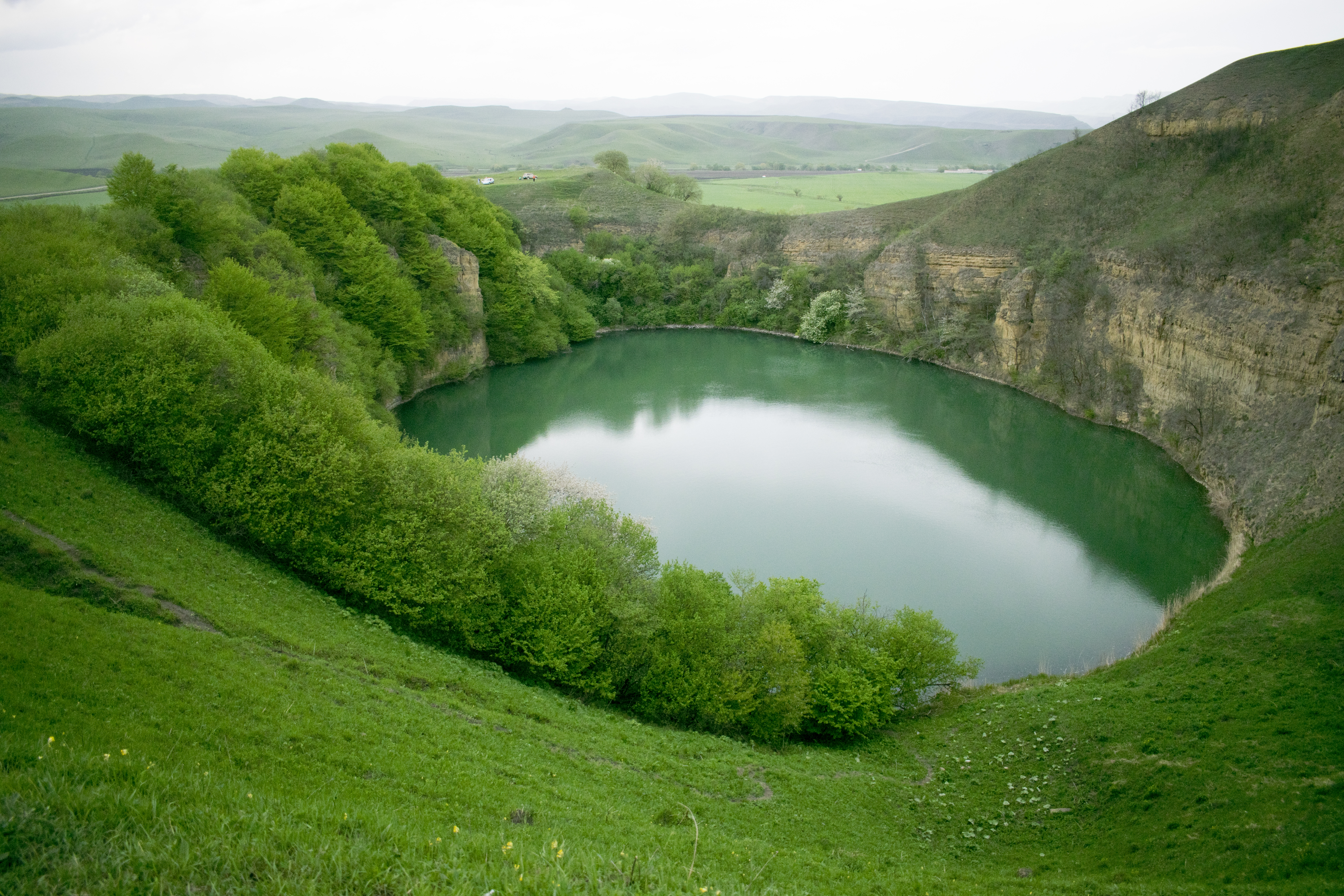 шахдурей 8 мая